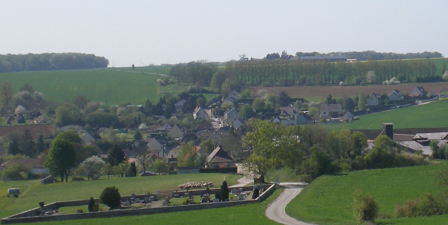 vue générale de lamécourt